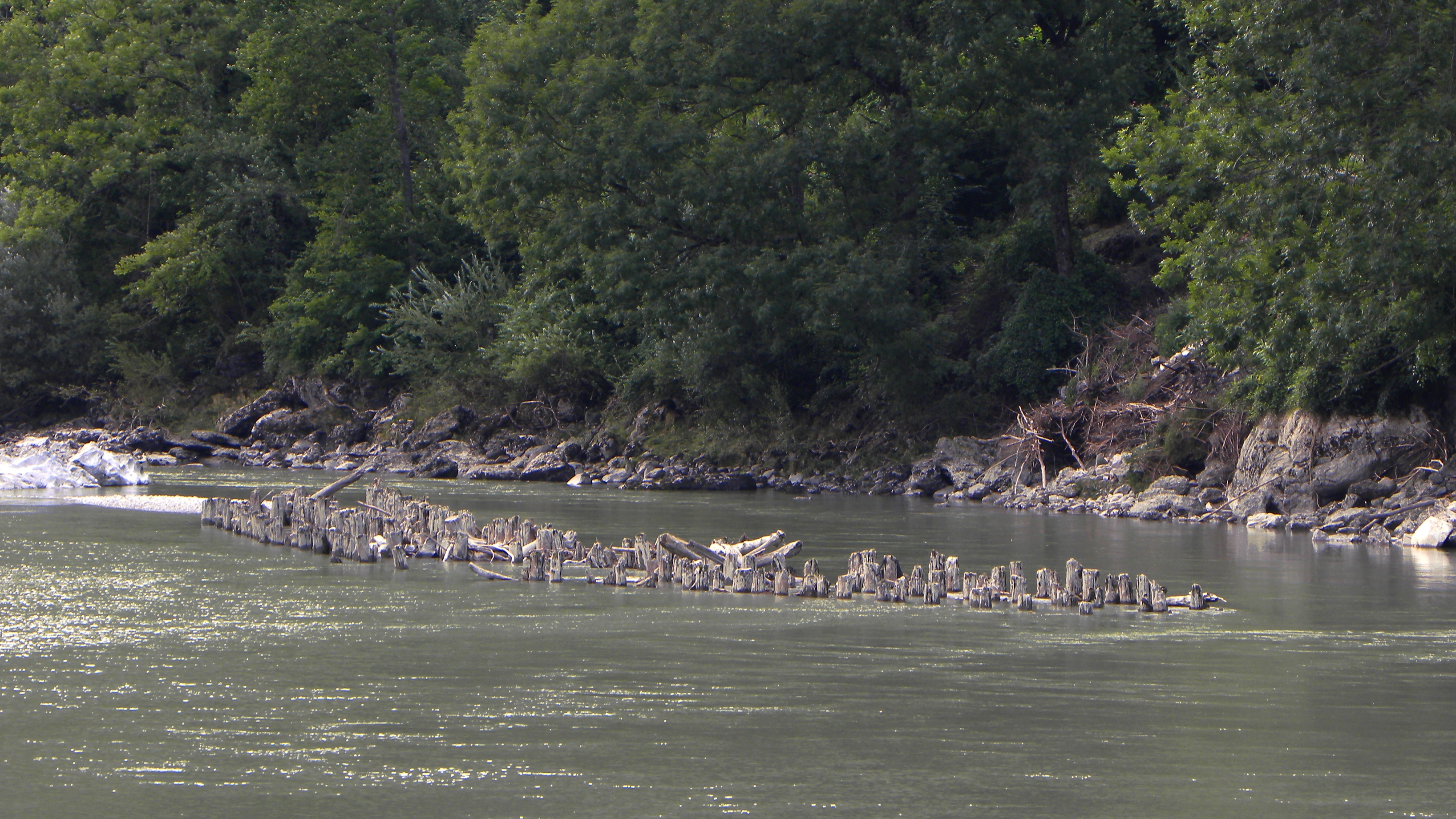 Reste des Hieflauer Ennstriftrechens